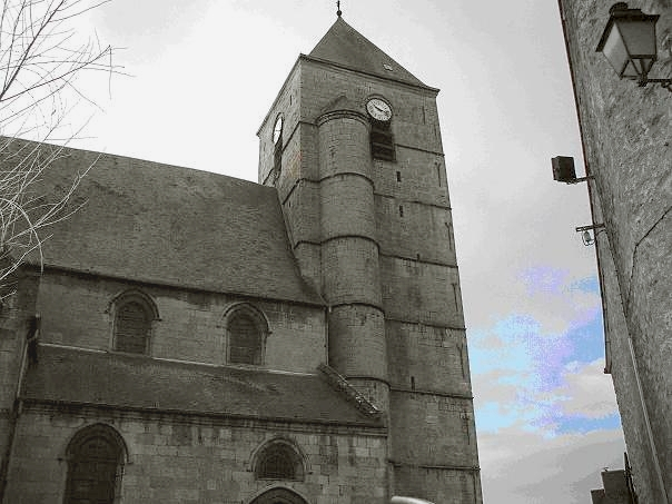 Eglise de Cousolre